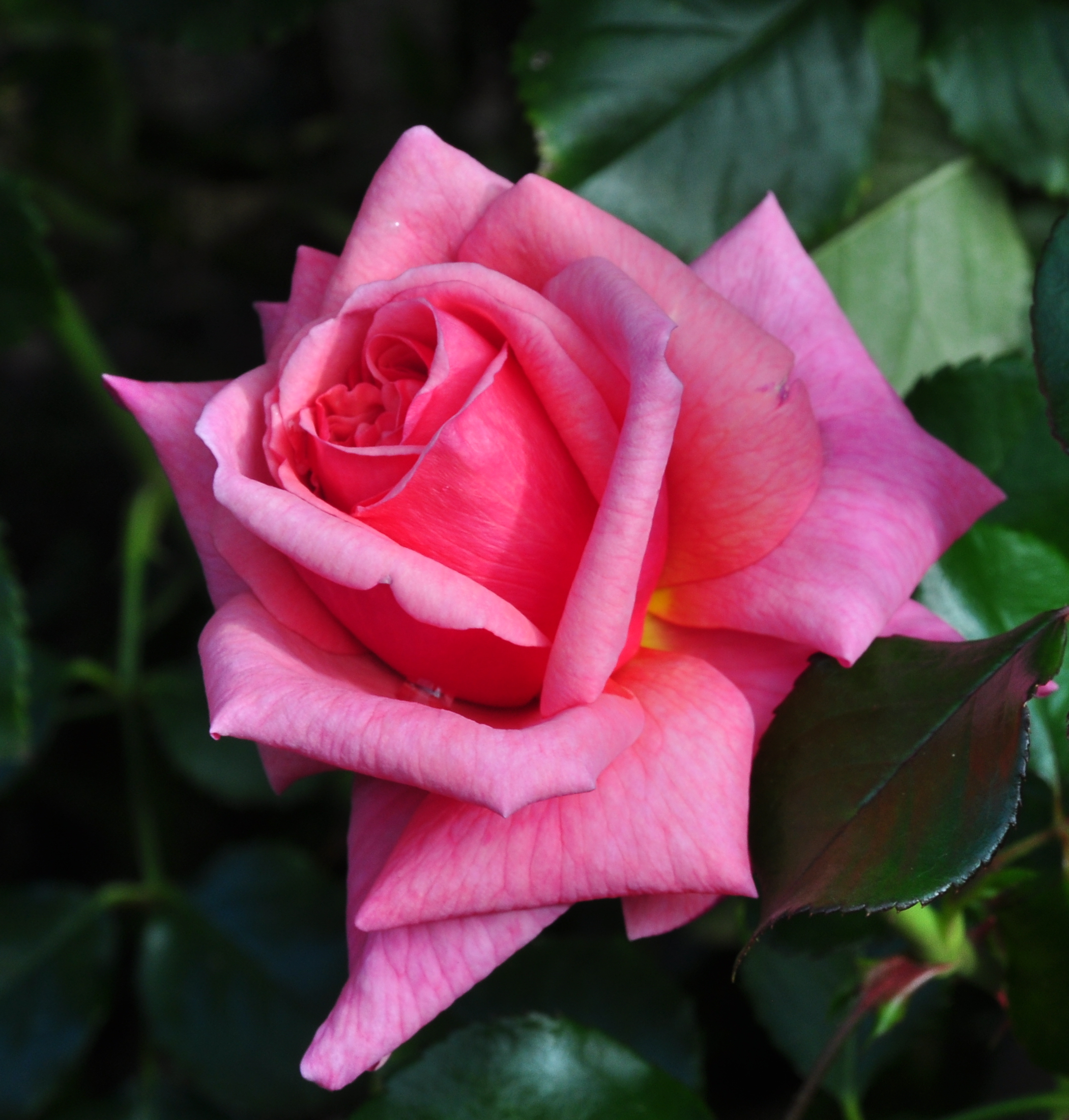 Tiffany (TH Lindqust 1954), Duftrosengarten in Rapperswil (Switzerland)